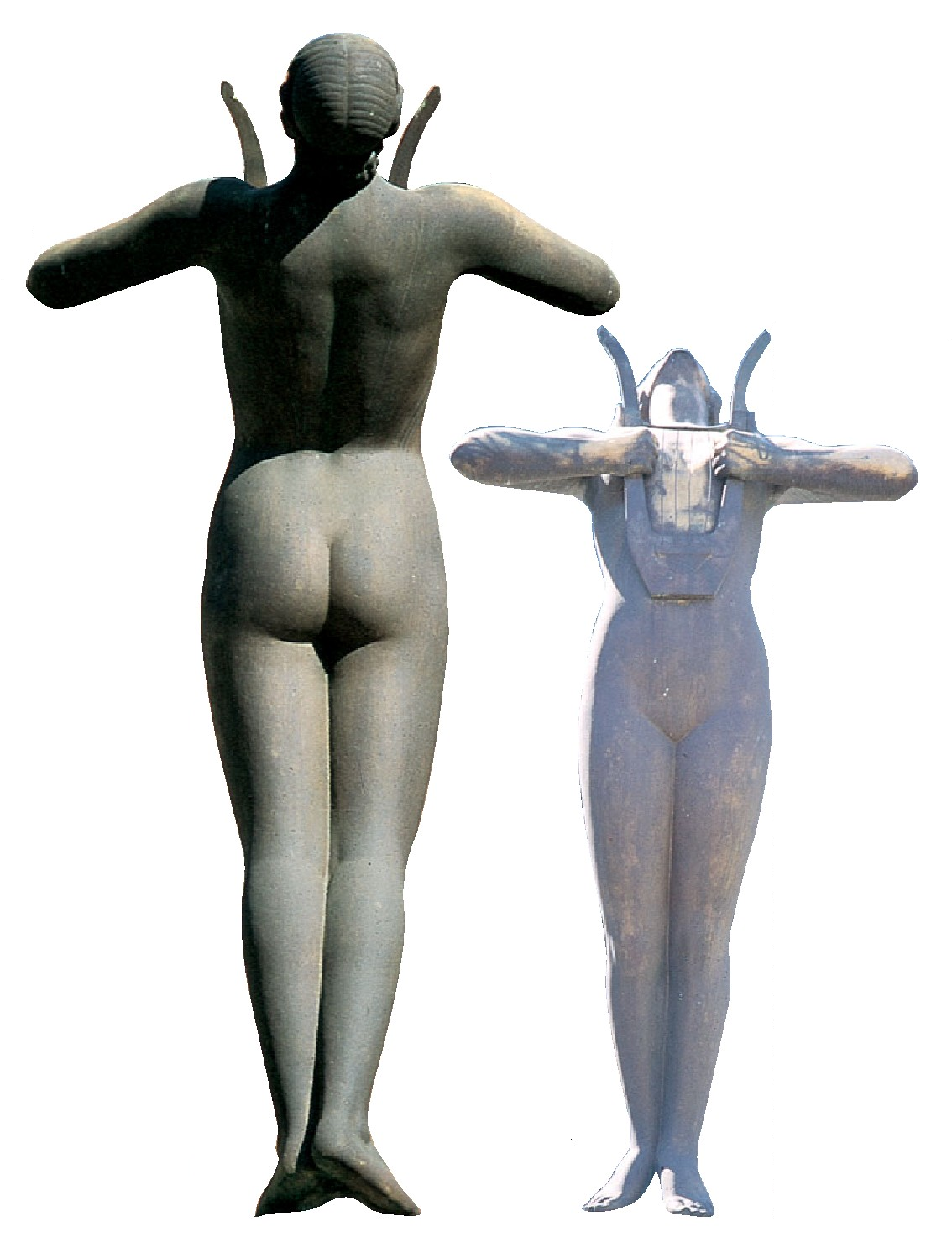 Bilboko “Monumento a Arriaga” monumentuaren atzealdea eta aurrealdea, Francisco Durrio